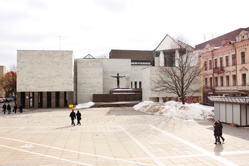 Mykolo Žilinsko dailės galerija.